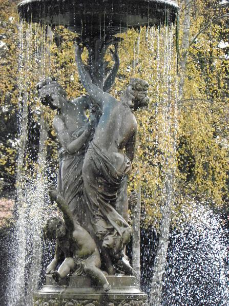 Fontaine du jardin Dumaine à Luçon (85).